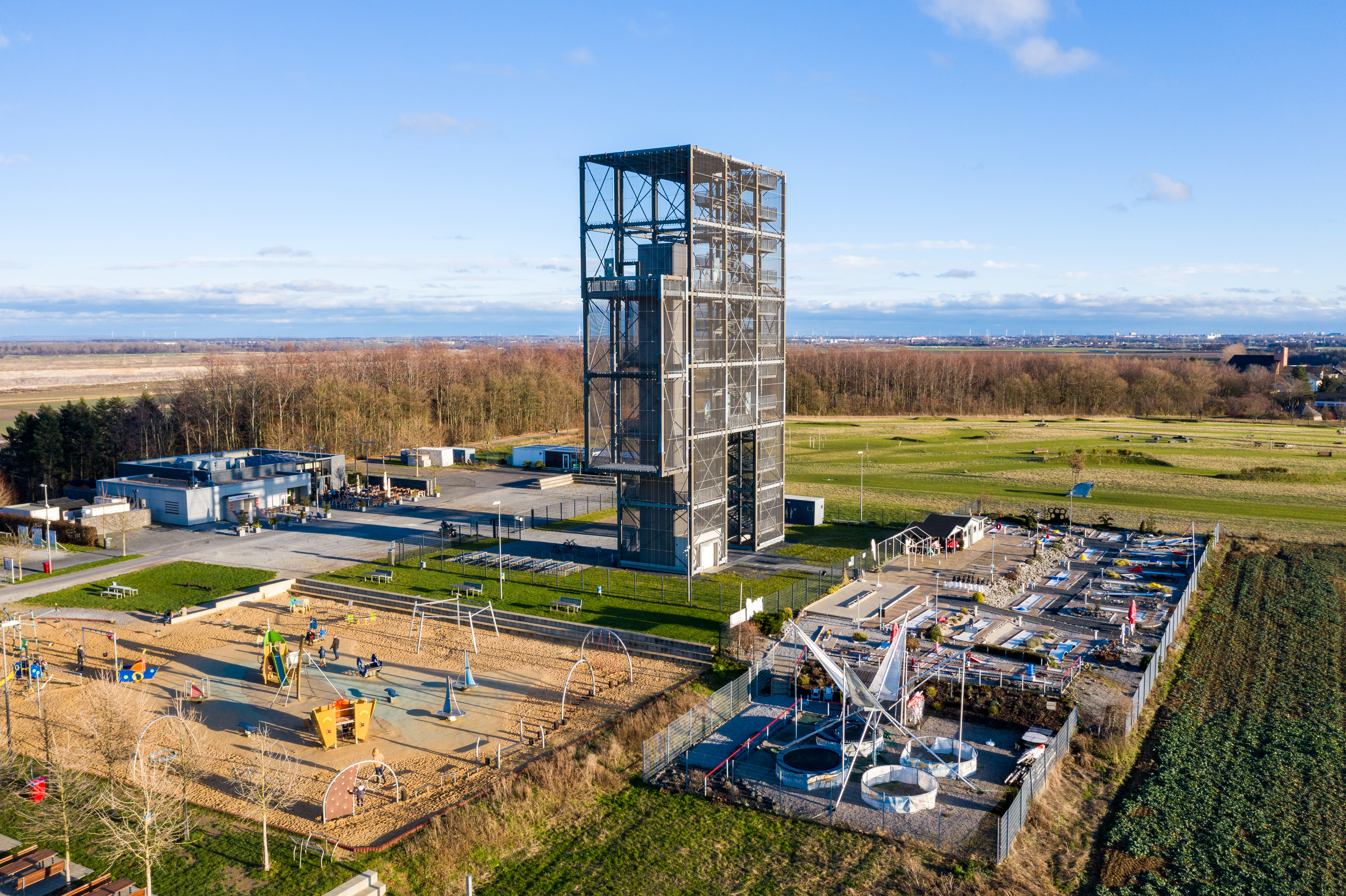 Luftaufnahme Indemann mit Spielplatz und Minigolf